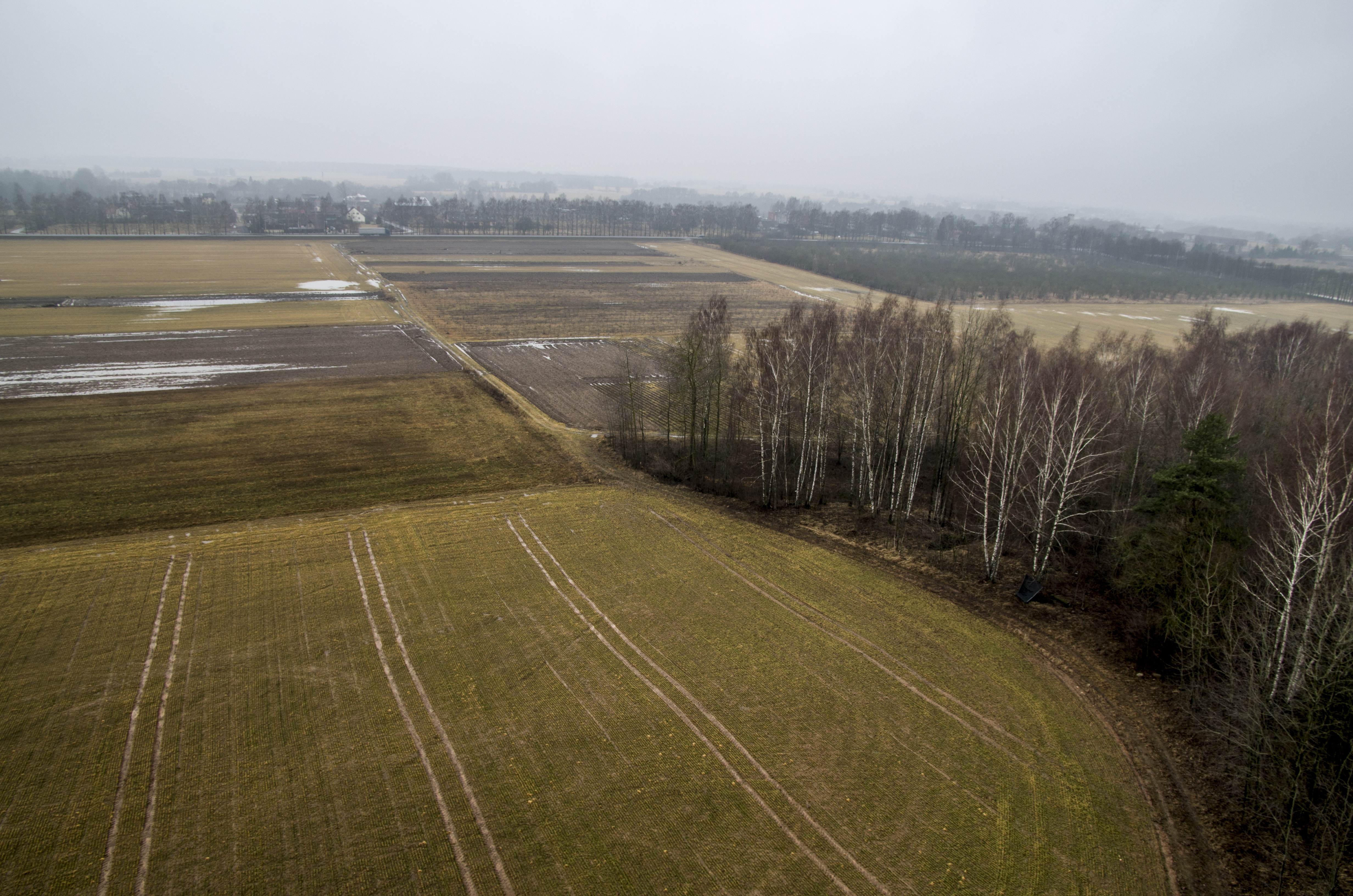 skats no augšas-triangulacijas tornis